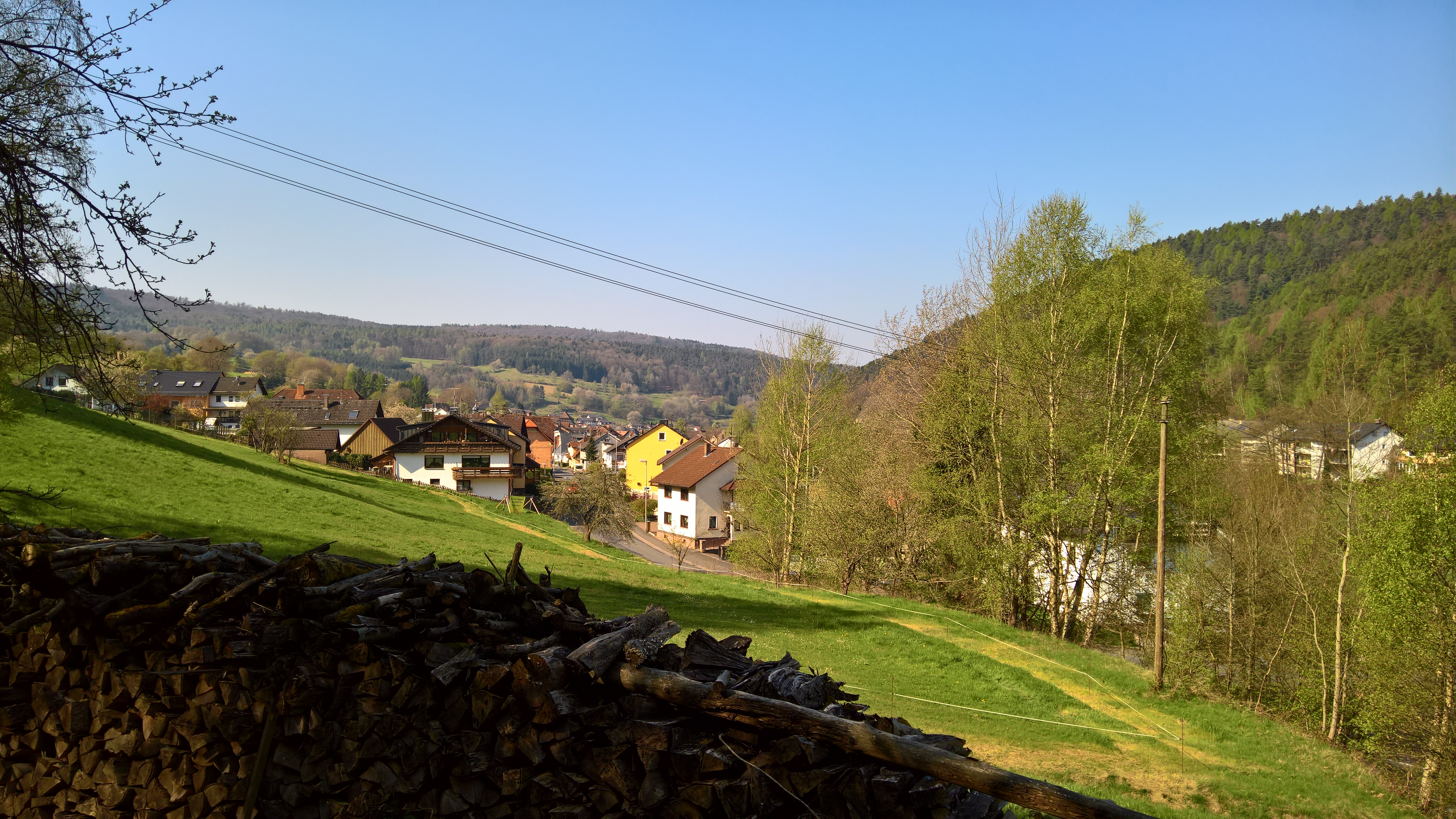 Blick nach Dammbach-Krausenbach vom Orstausgang am Unterschnorrhof